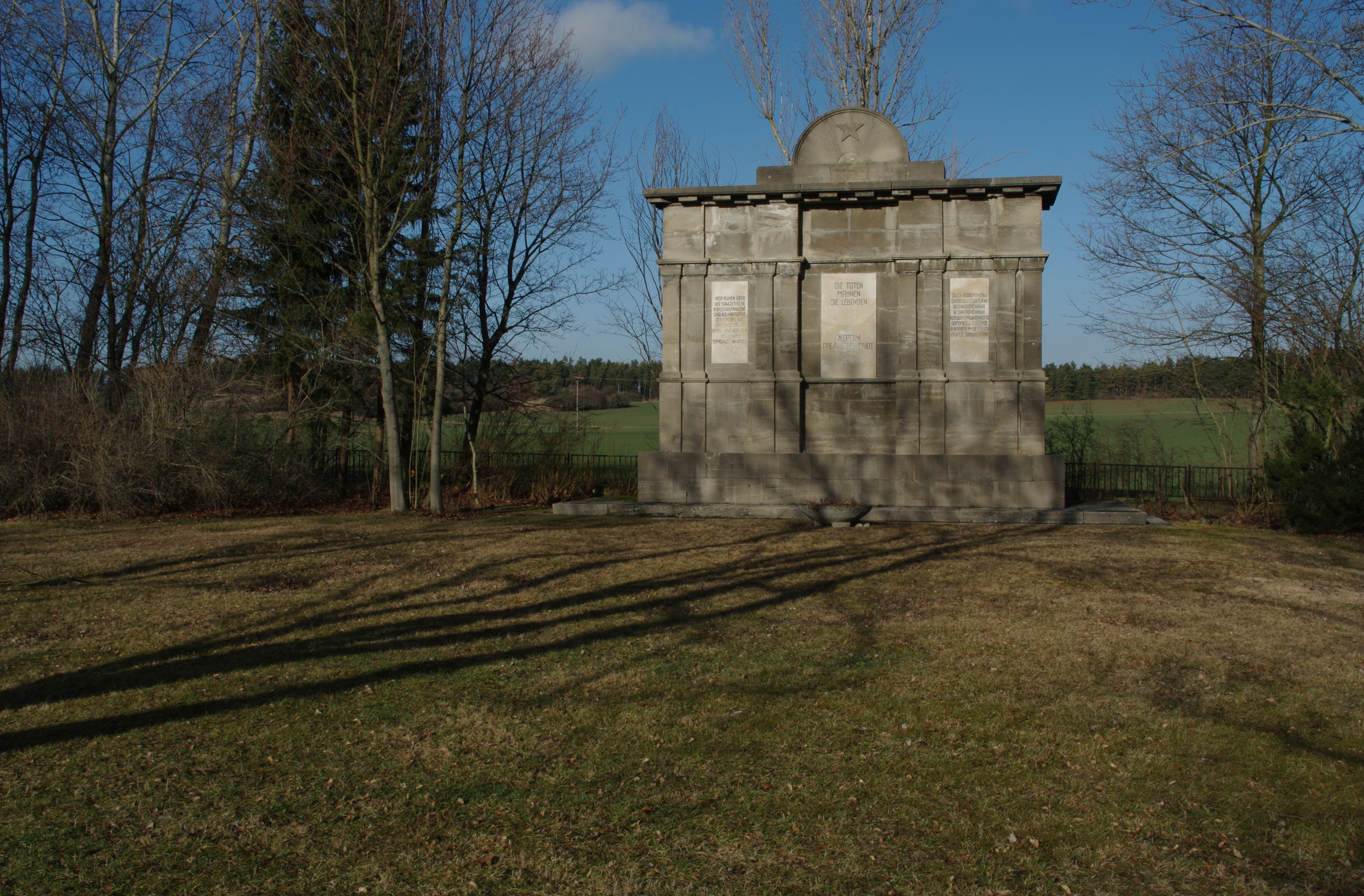 Die Gedenkstätte Espenfeld